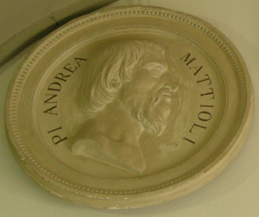 Specola, medaglione di pietro andrea mattioli